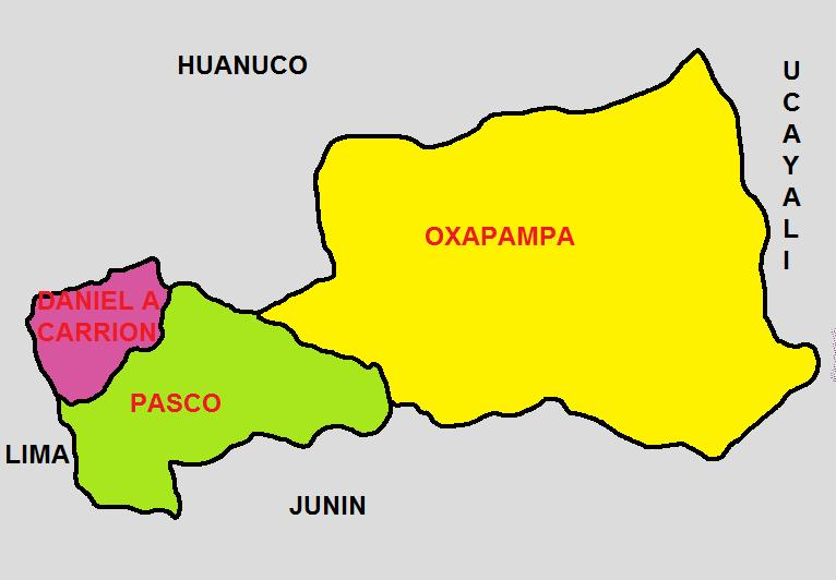 Imagen que muestra la División Politica del Departamento de Pasco, una de las 25 circunscripciones en que se divide el Perú